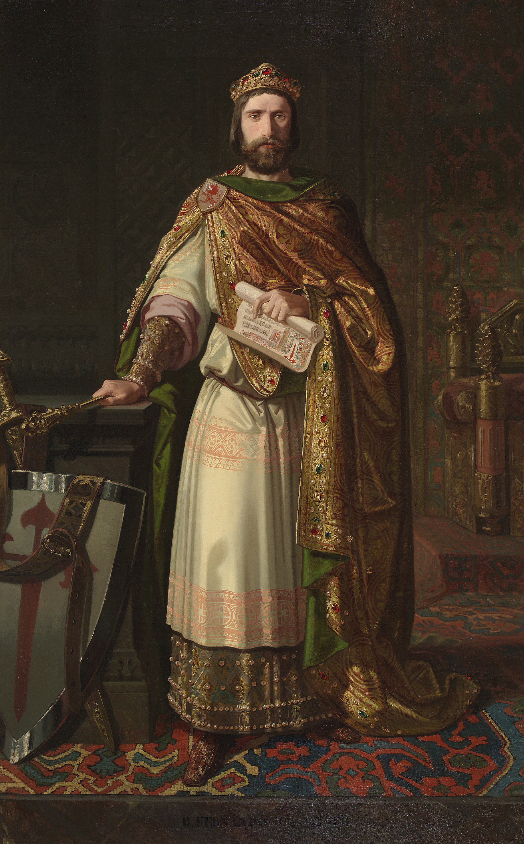 Retrato imaginario del rey Fernando II de León. Fue hijo del rey Alfonso VII de León y de la reina Berenguela de Barcelona. Reinó en León entre 1157 y 1188, año en que falleció en Benavente (Zamora). Fue sucedido por su hijo, el rey Alfonso IX de León.